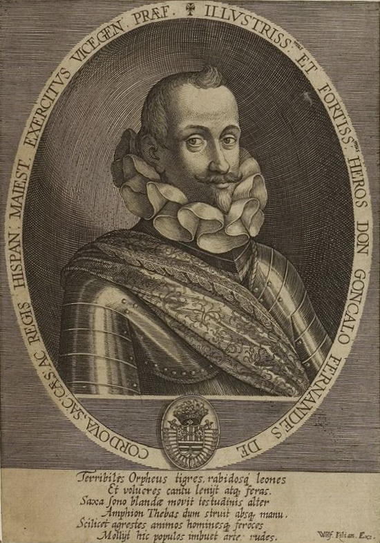 Grafik aus dem Klebeband Nr. 1 der Fürstlich Waldeckschen Hofbibliothek Arolsen Motiv: Gonzalo Fernández de Córdoba